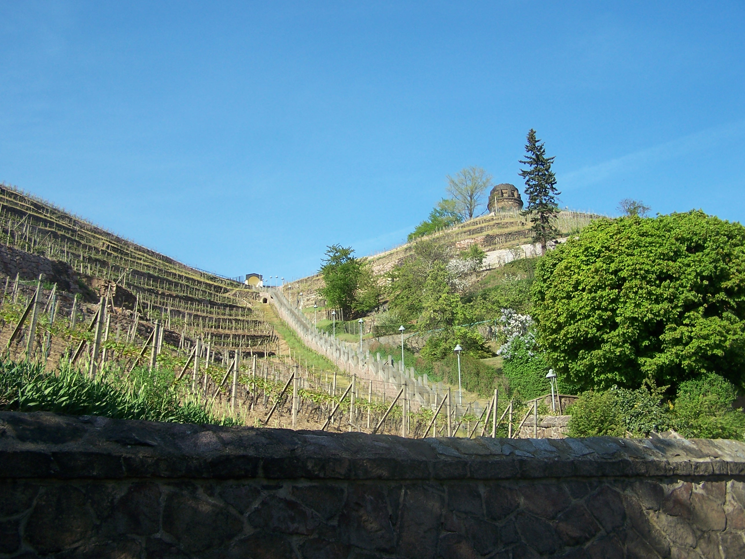 Spitzhaustreppe in Radebeul und der Bismarckturm